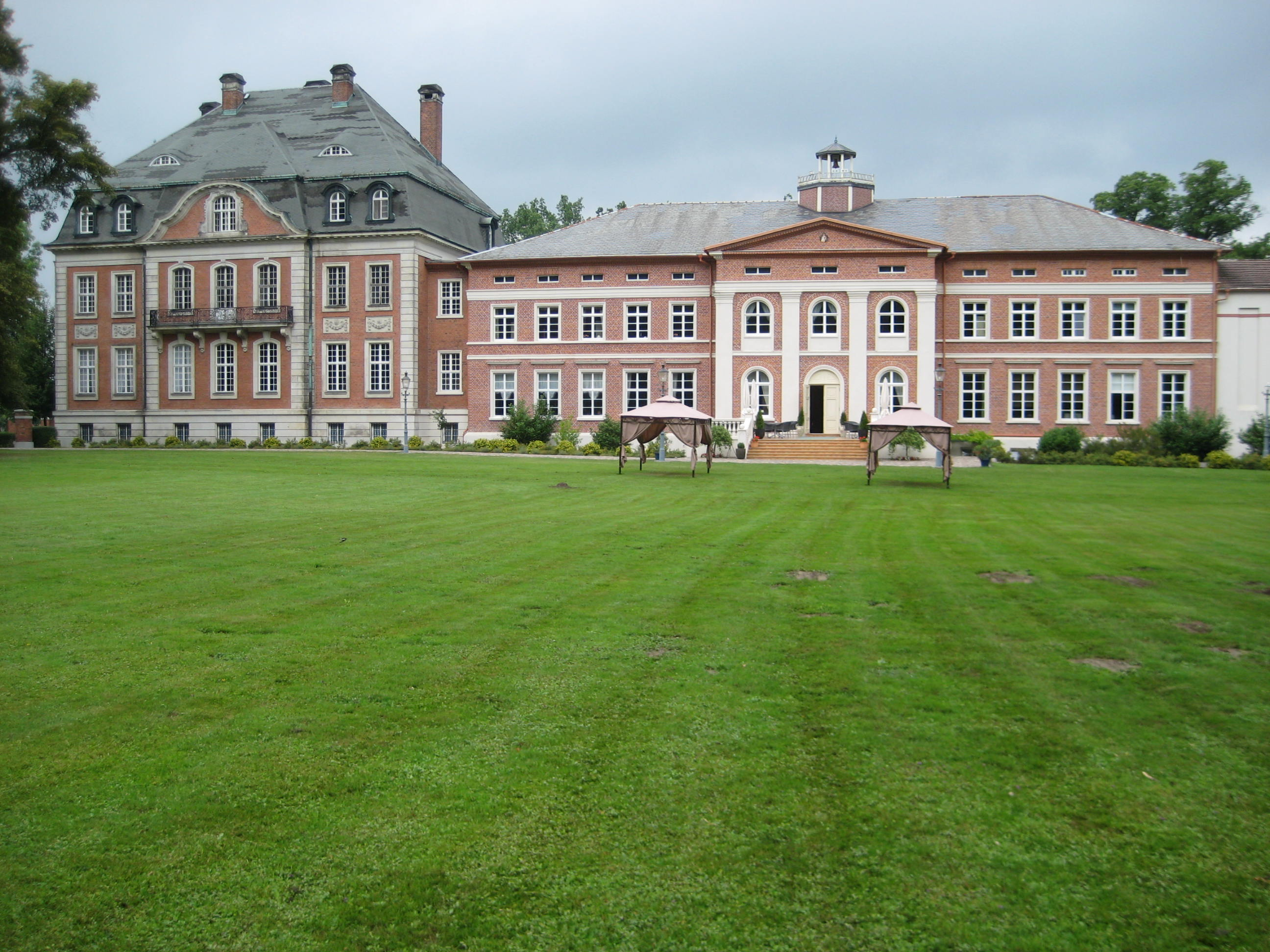 Schloss Karow in Karow, Gartenseite